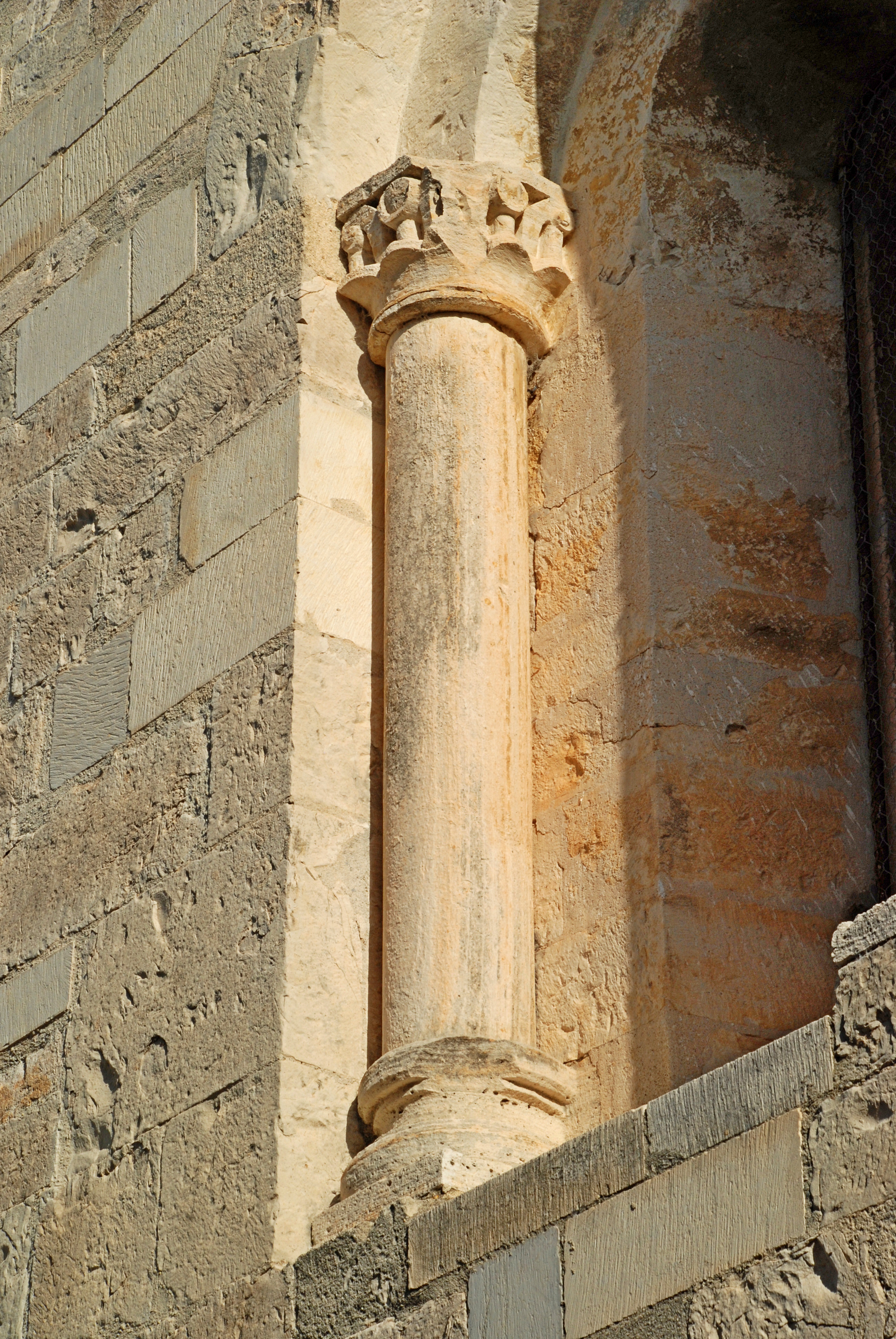 France - Hérault - Église Saint-Martin de Campagne